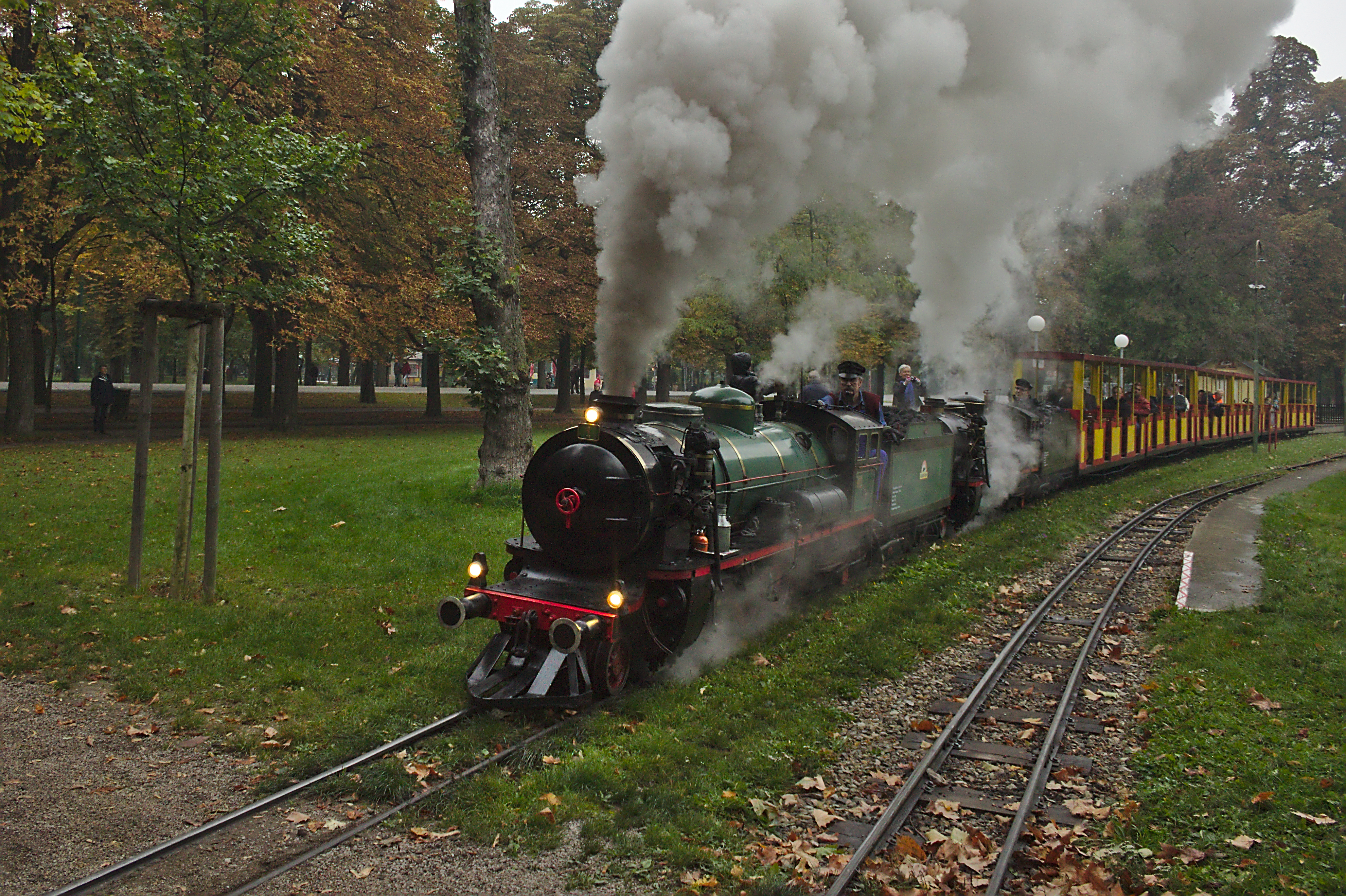 Zug der Liliputbahn Prater gezogen von zwei Dampflokomotiven in der Station Rotunde Richtung Süden